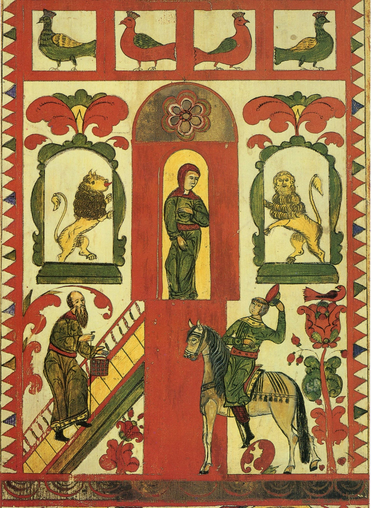 Сватовство. Фрагмент росписи прялки. Начало XX в. Дерево, резьба, роспись. Село Борок, Архангельская губ.